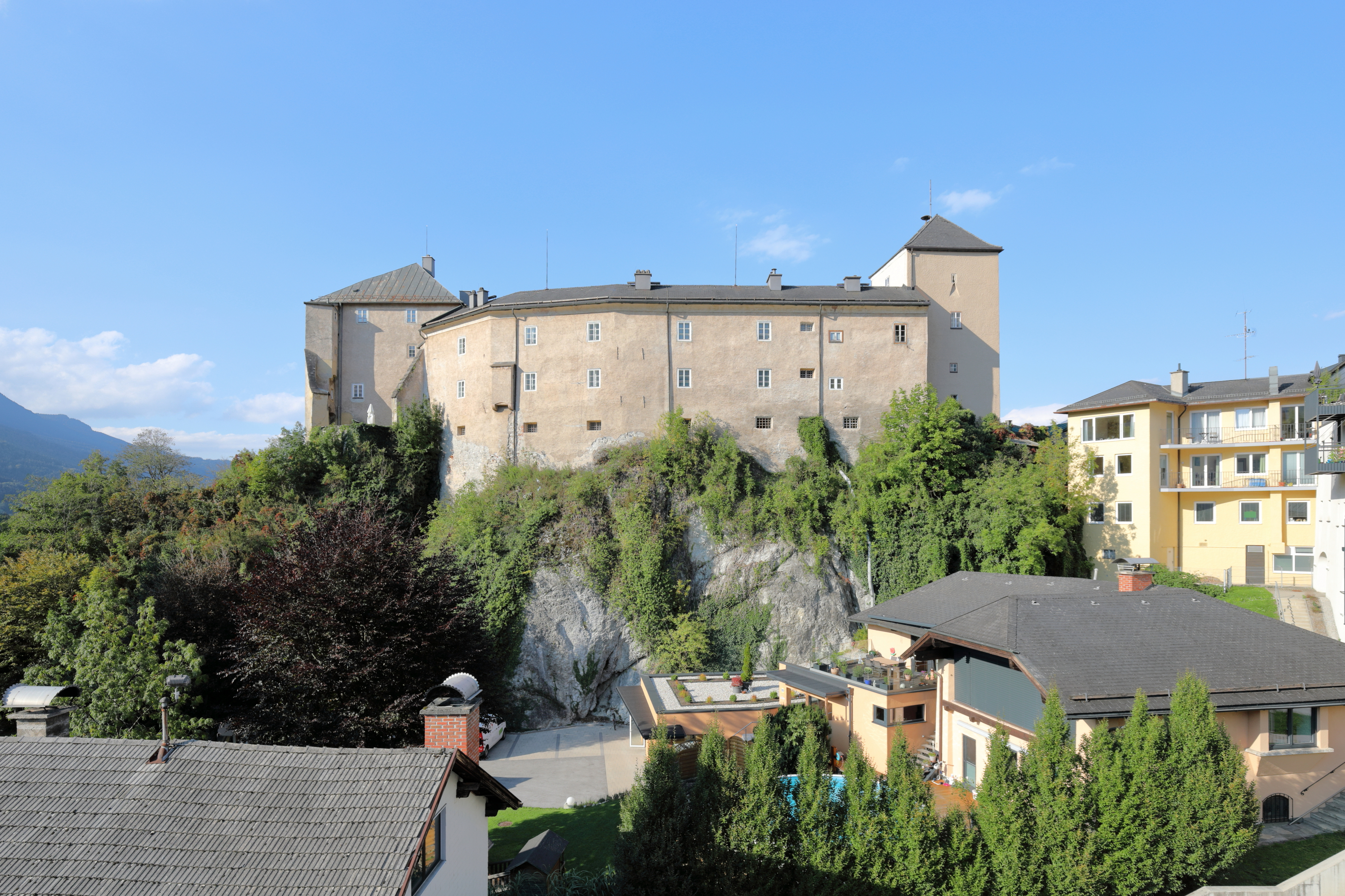 Südansicht der Burg Golling in der Salzburger Marktgemeinde Golling an der Salzach.